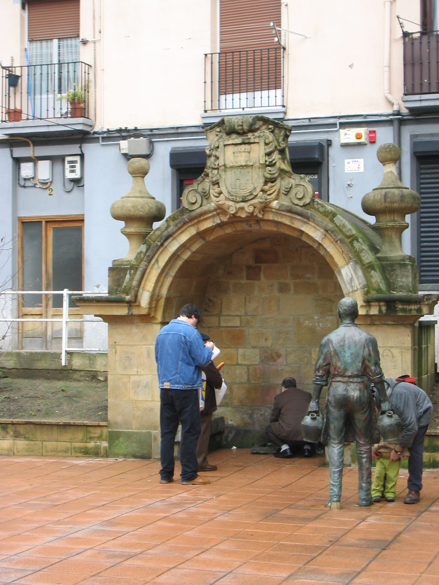 Fuente de Urkizu de Eibar, Guipúzcoa (País vasco) (España).